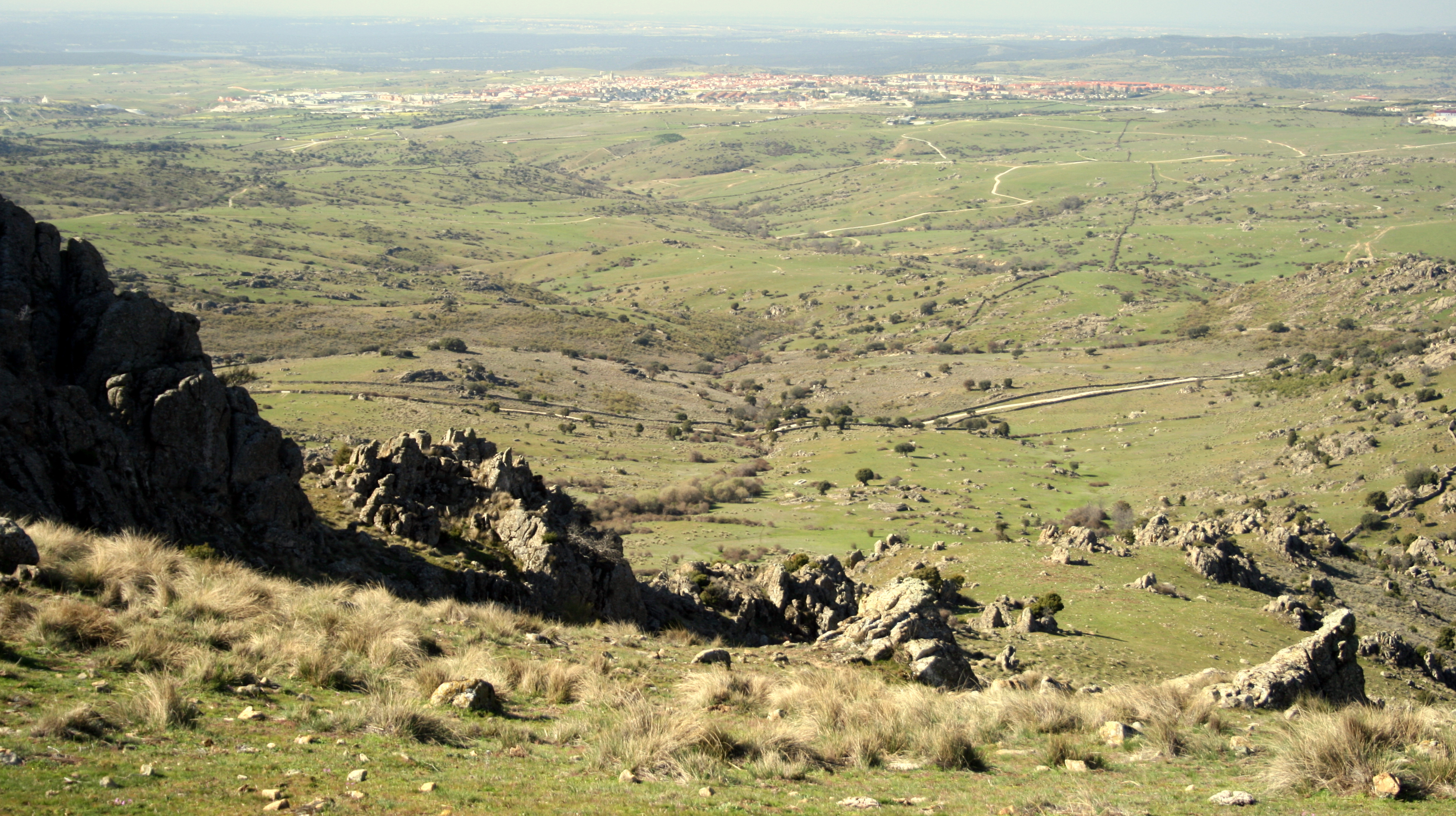 Dehesa de Navalvillar en Colmenar Viejo, Madrid (España). Vista desde el Pico San Pedro (1425 m).